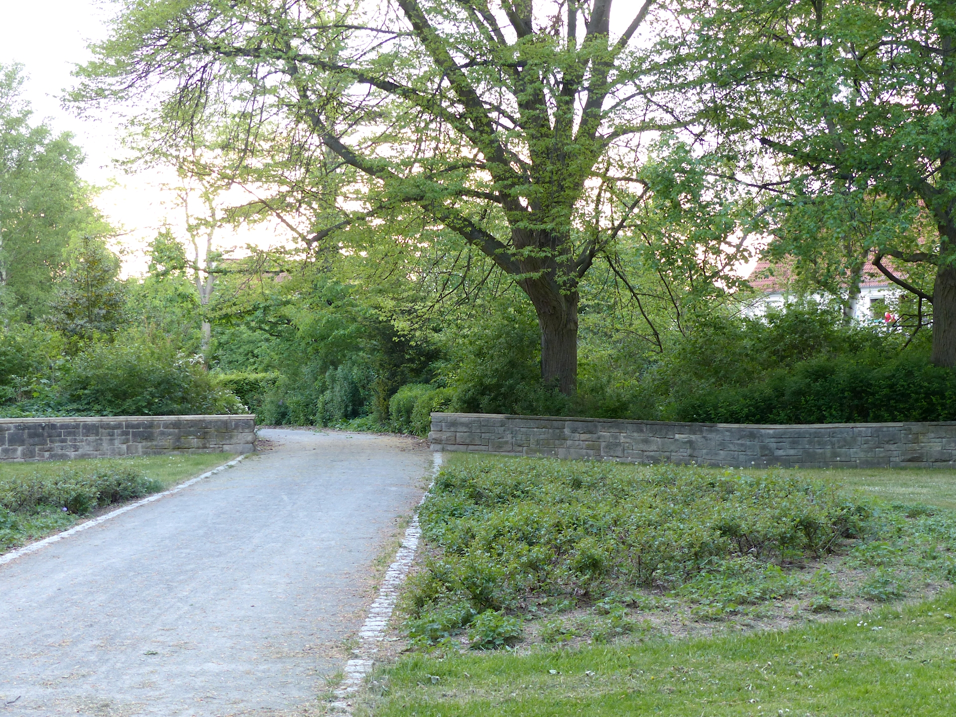 Ausschnitt aus dem Rondel von Sitzmauern im Hermann-Löns-Park